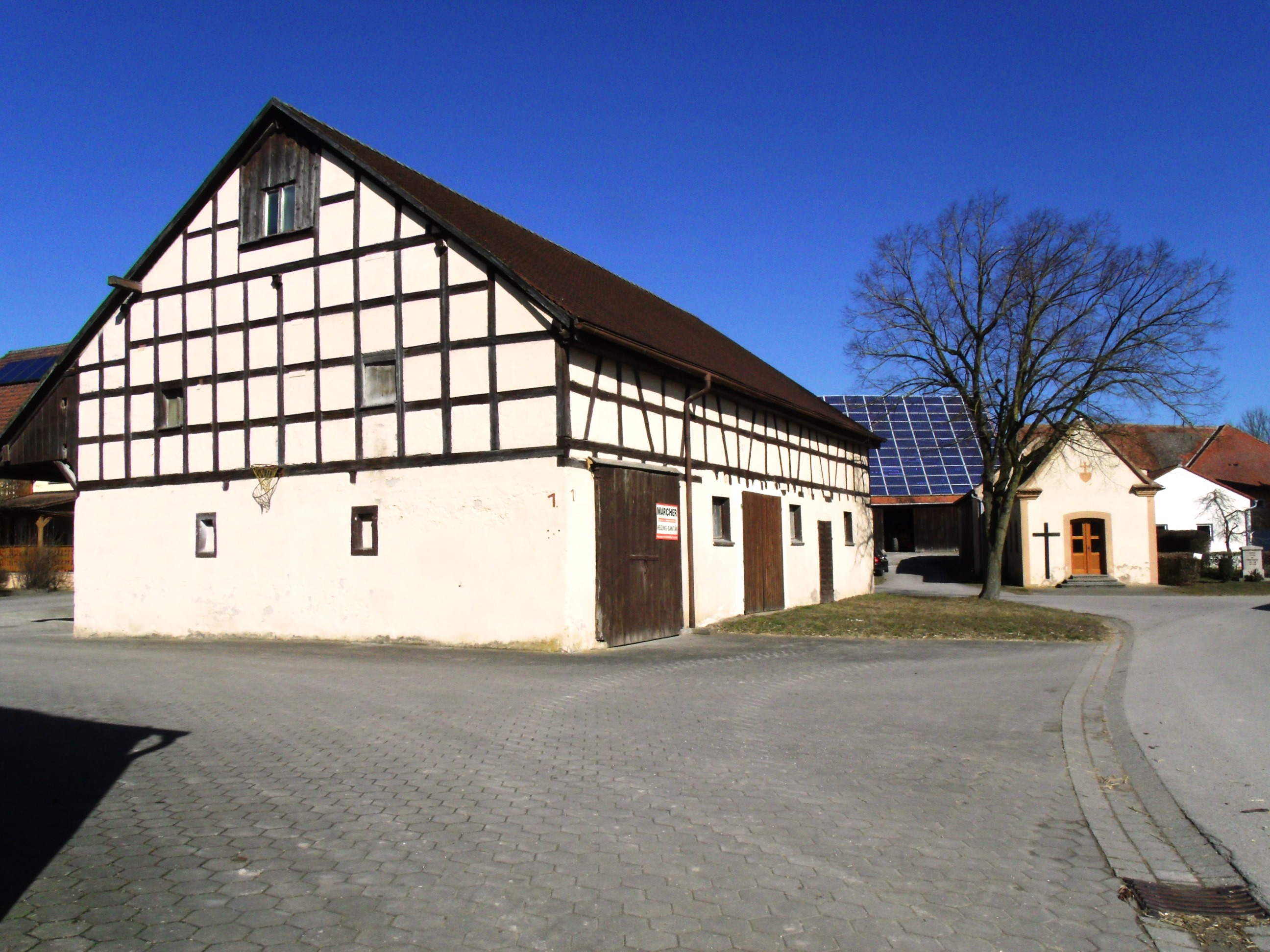 Stadel, Ortsteil der Stadt Herrieden im mittelfränkischen Landkreis Ansbach, Ortsmitte mit Ortskapelle